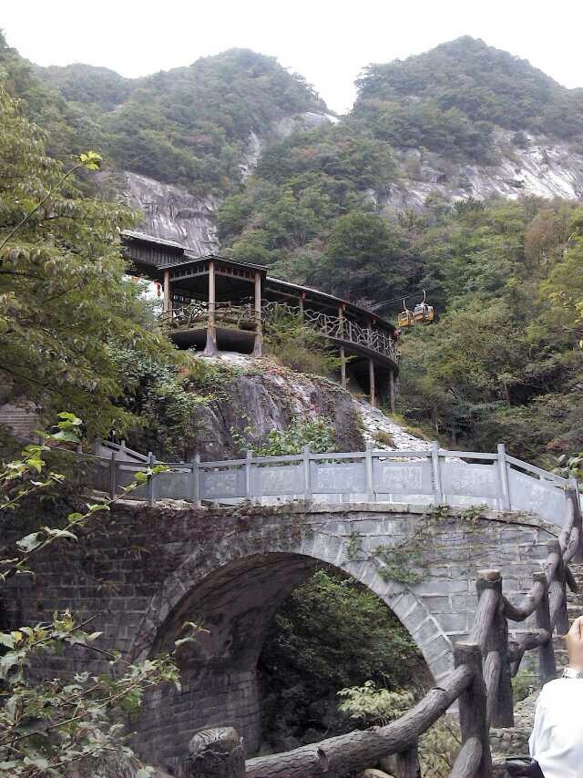 天堂寨風景区